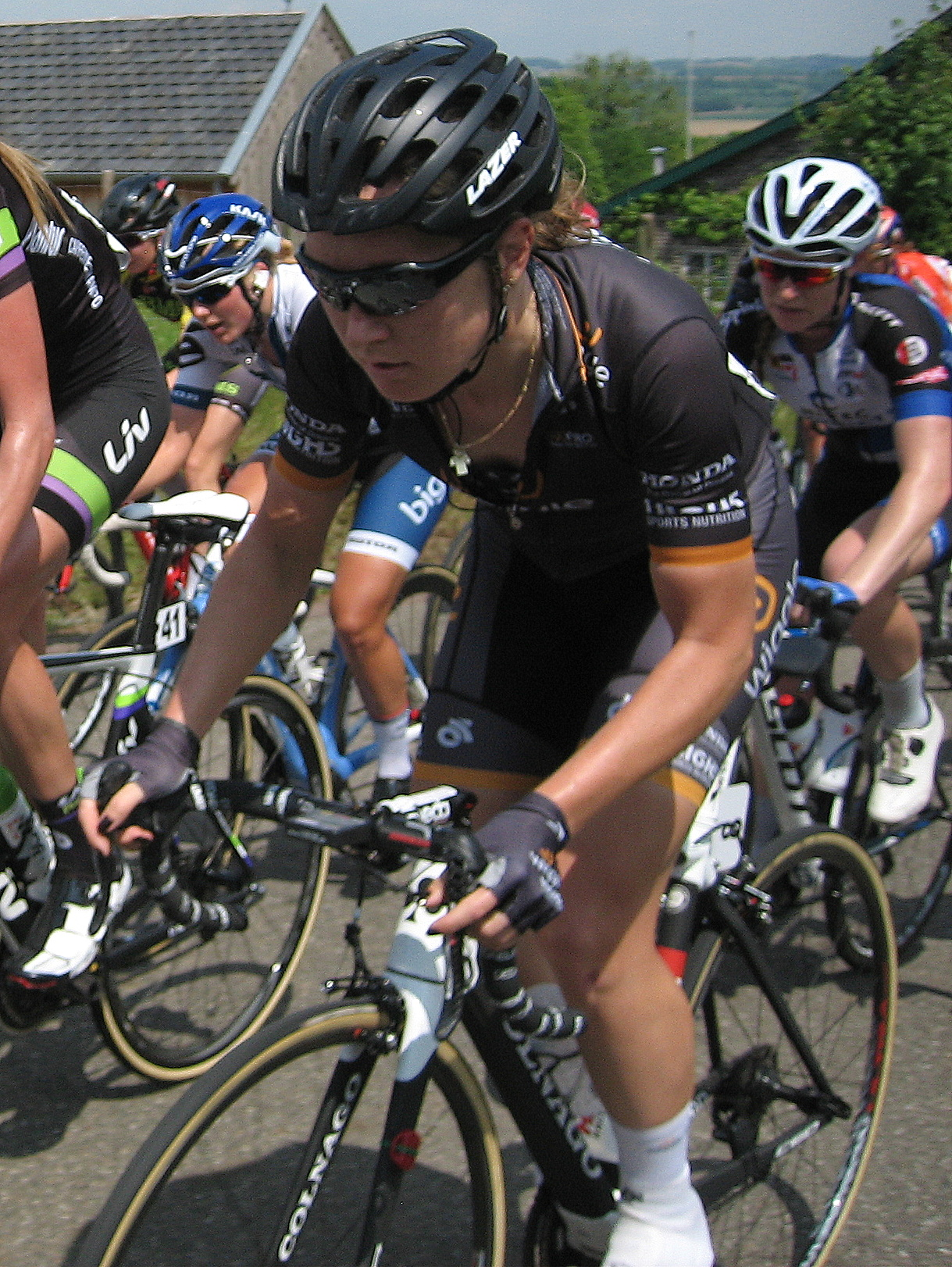 Amy Pieters (Wiggle High5) in Hills Classic 2016